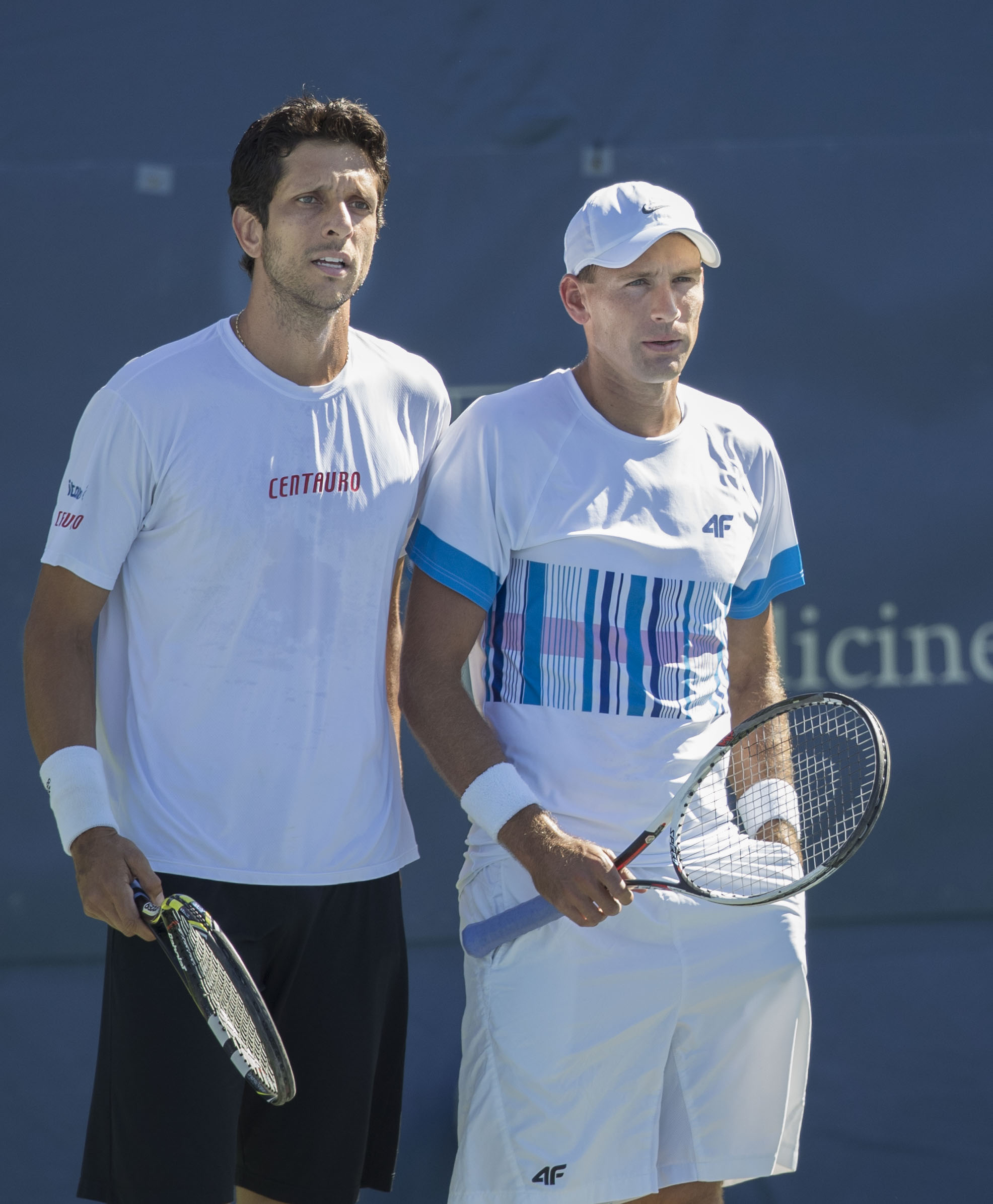 Citi Open Tennis 2017